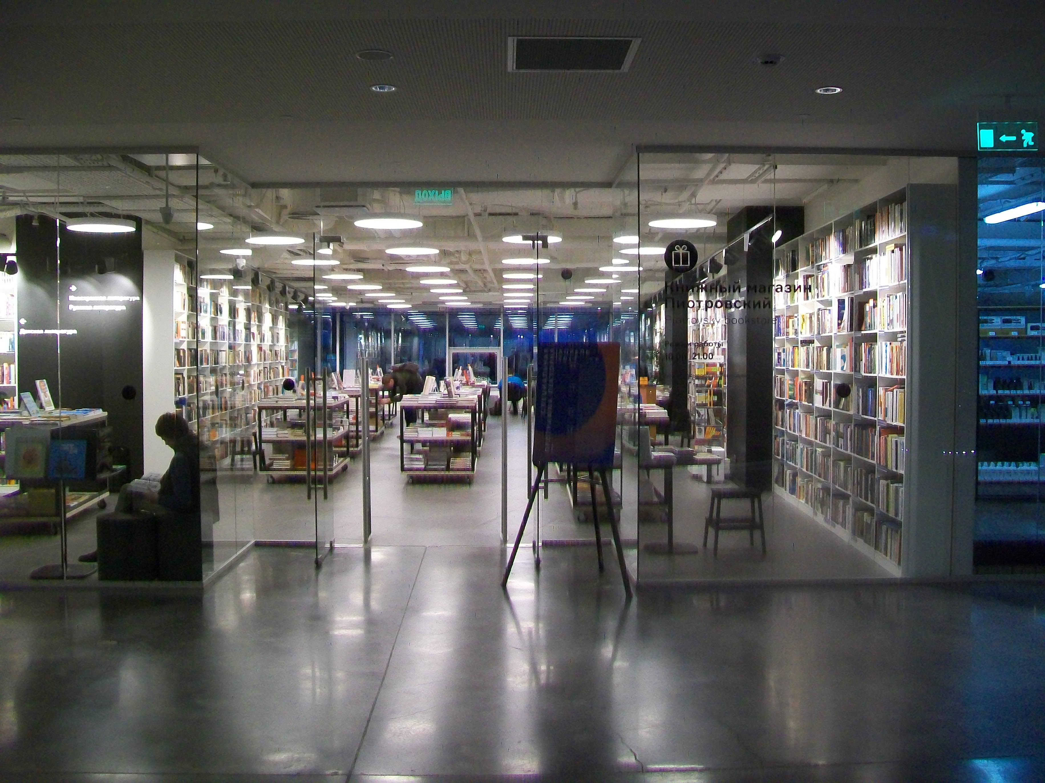 Магазин "Пиотровский" в Екатеринбурге, Ельцин-центр, 19 апреля 2017 года